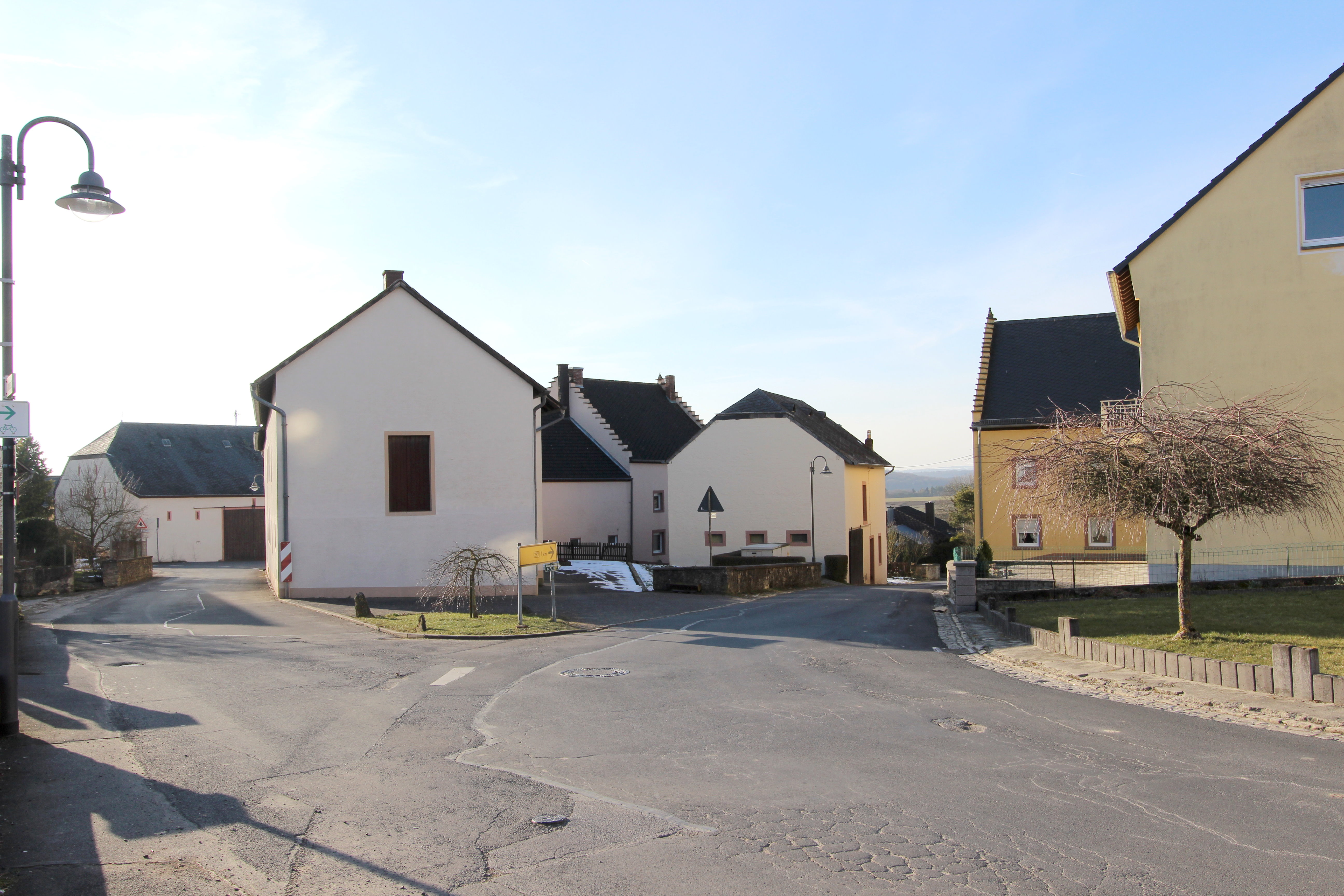 54634 Bitburg-Masholder, Ecke Tannenstraße - Im Wingert. Kern des Haufendorfs aus Hofanlagen aus dem mittleren 18. und dem 19. Jahrhundert einschließlich Kirche und Kirchhof. Der äußerlich wenig veränderte Ortskern besticht durch eine große Dichte von Einzeldenkmäler. Aufnahme von 2018.